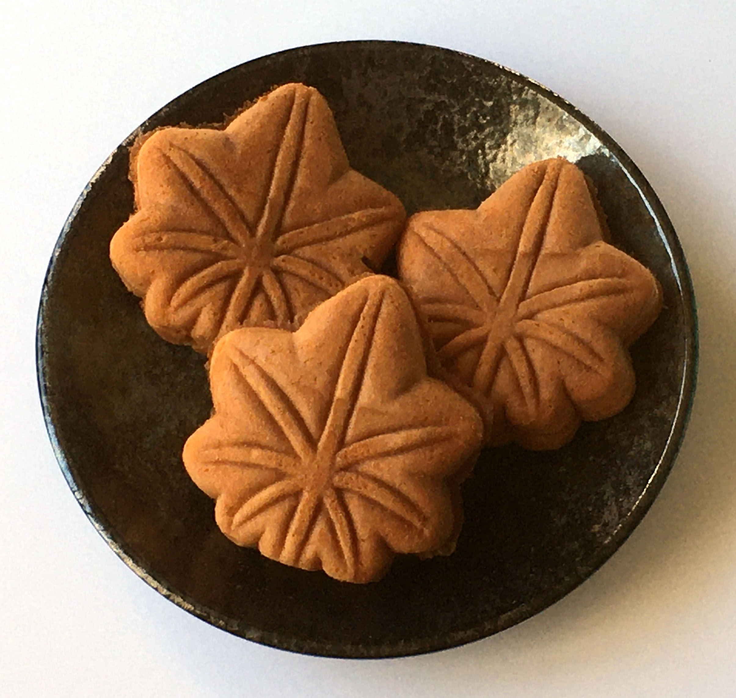 やまだ屋 もみじ饅頭（1個92円）